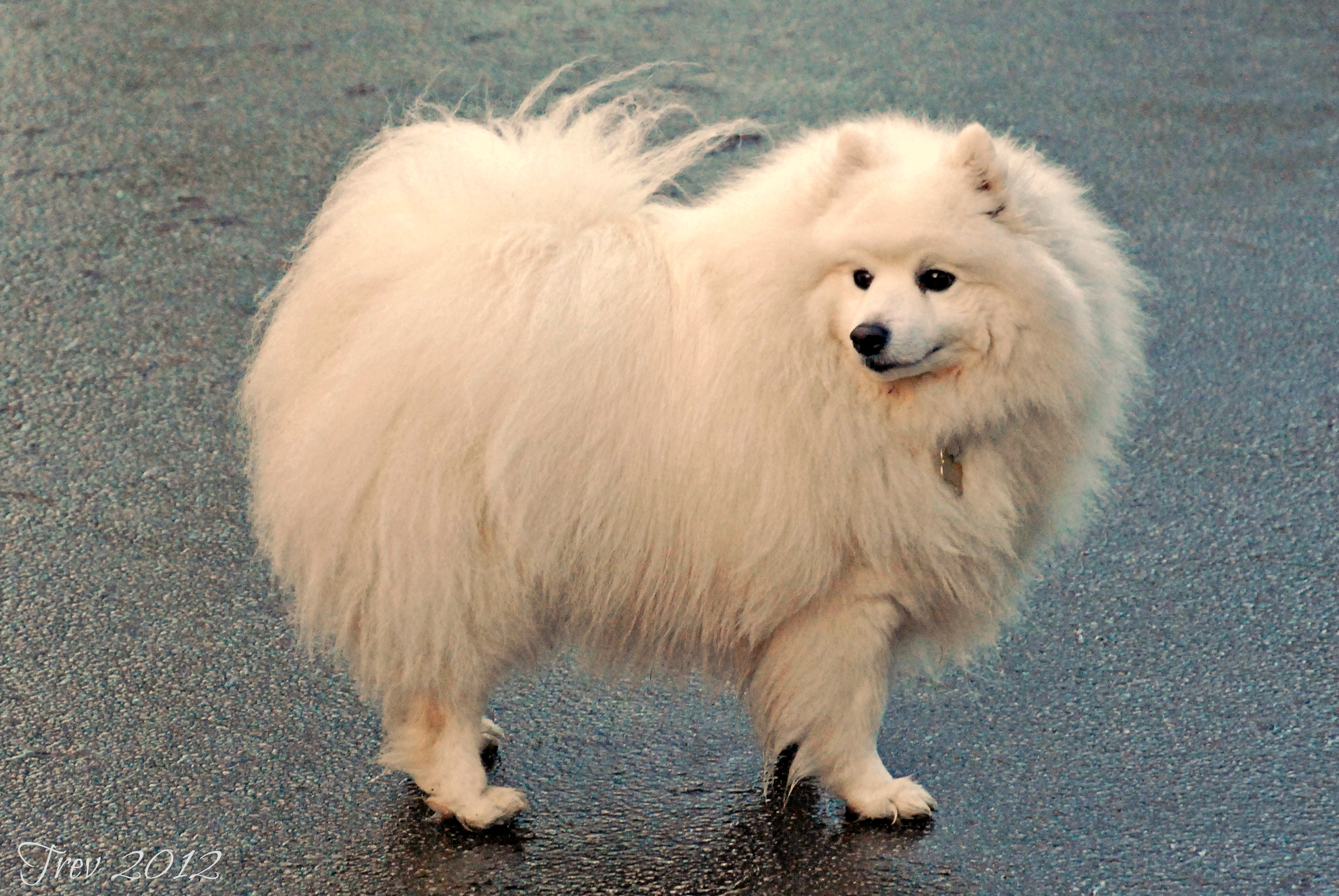 Japanese Spitz